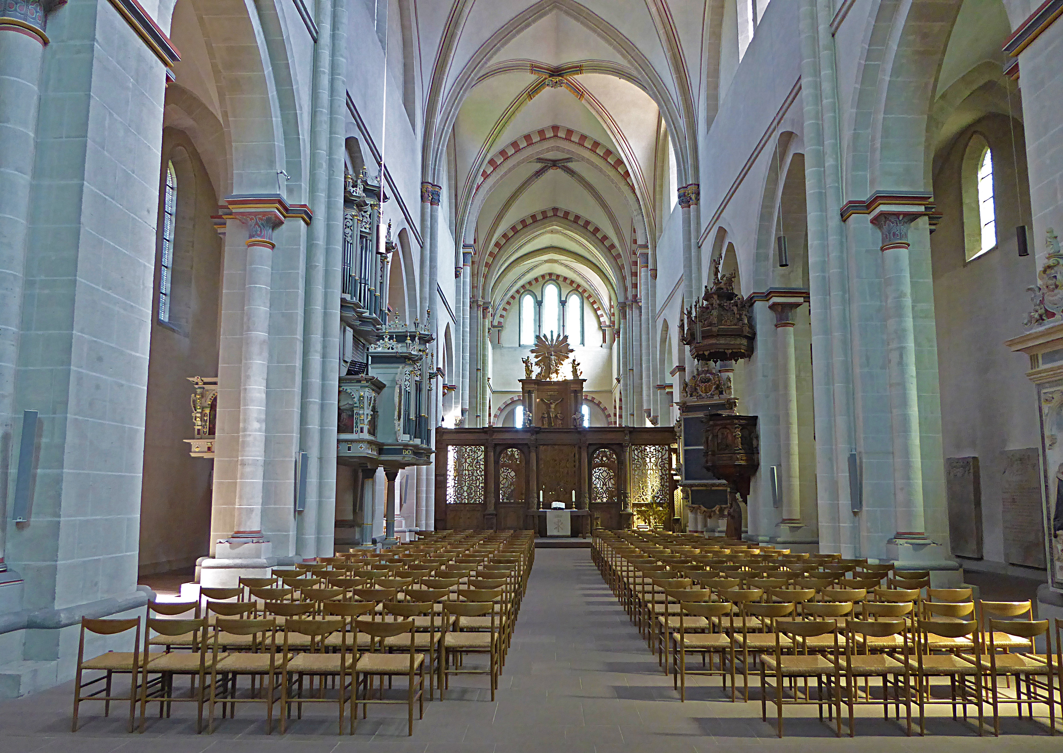 Blick ins Kirchenschiff der Klosterkirche Riddagshausen (Braunschweig)